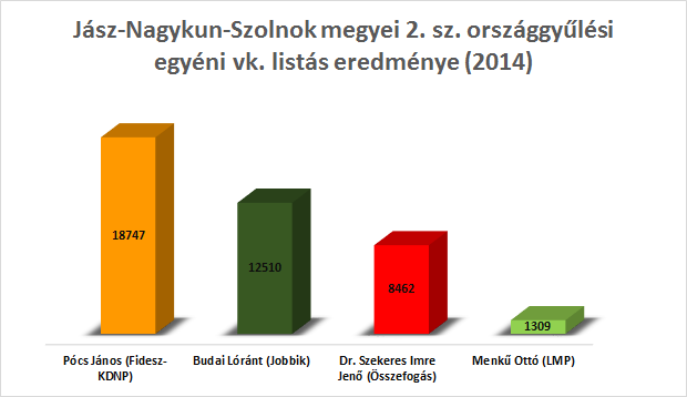 Jász-Nagykun-Szolnok megyei 2. sz. országgyűlési egyéni vk. listás eredménye (2014)